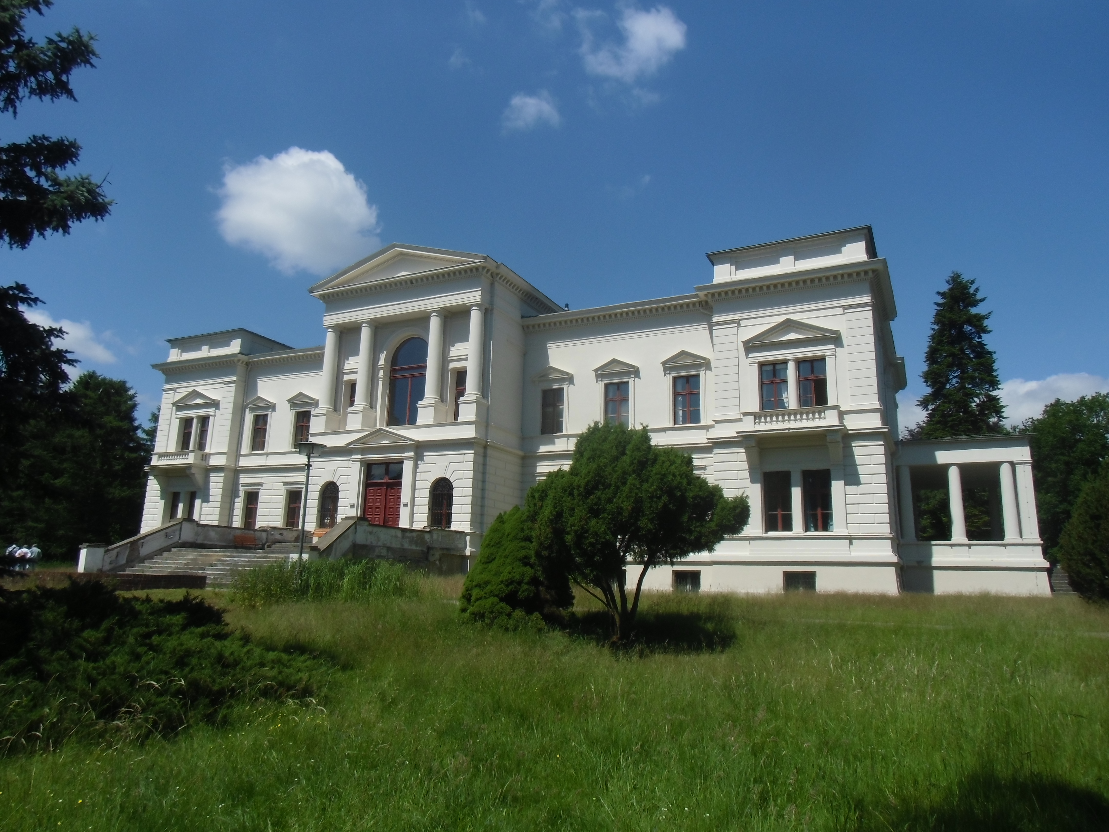 Denkmalgeschützte Schlossanlage in Sommerswalde, Ortsteil von Oberkrämer, errichtet 1888-1891